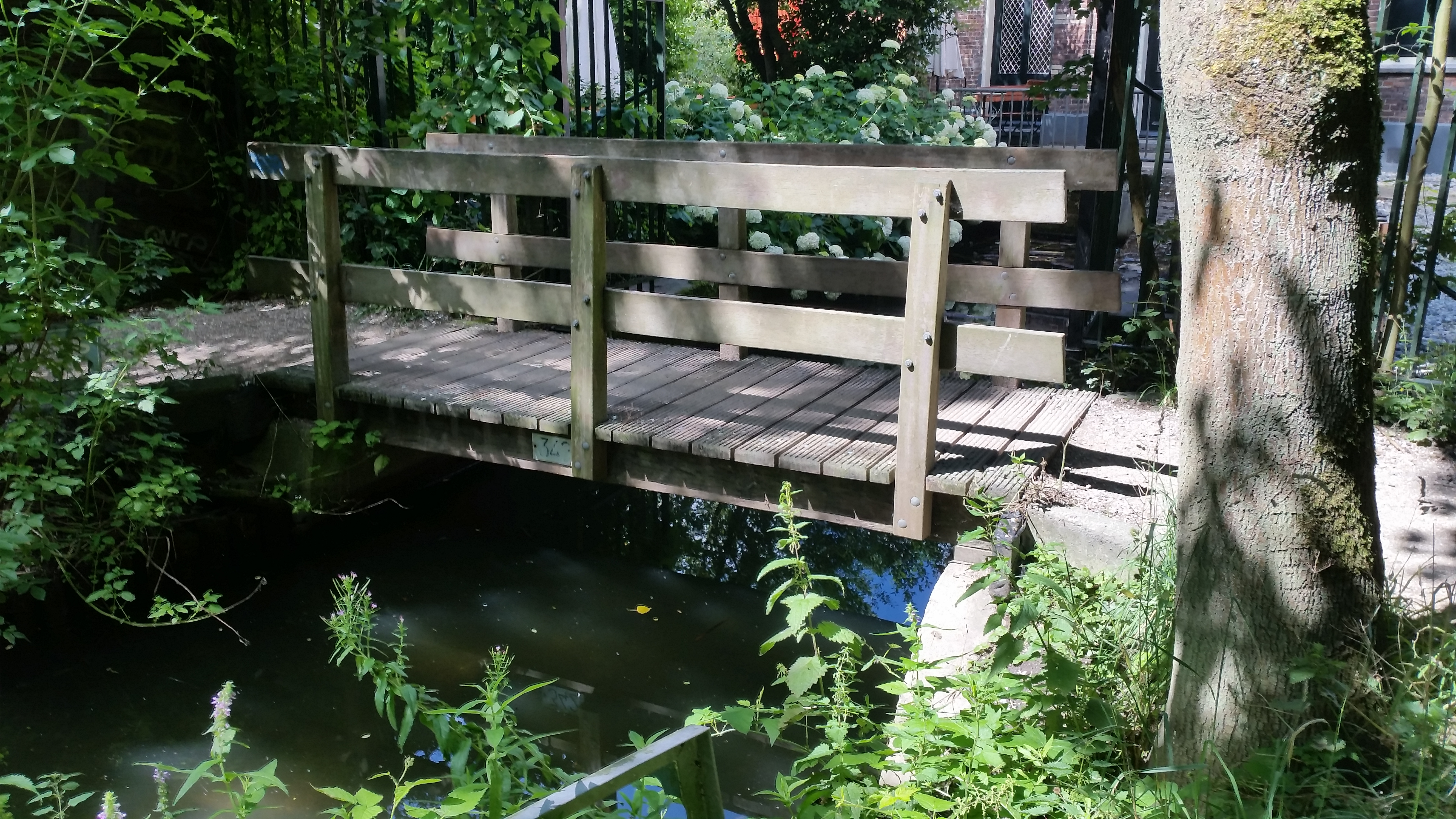 Voetbrug 342 in het Flevopark te Amsterdam